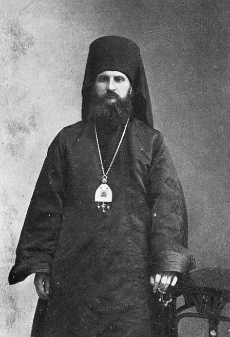 Епископ Уфимский и Мензелинский Андрей (князь А.А.Ухтомский) (1872/1873 - 1937).